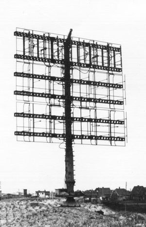 FuMG 41 "Freya LZ", verbunkert, Stützpunkt Lama Aufgenommen in Thyborön / Westjütland / Dänemark